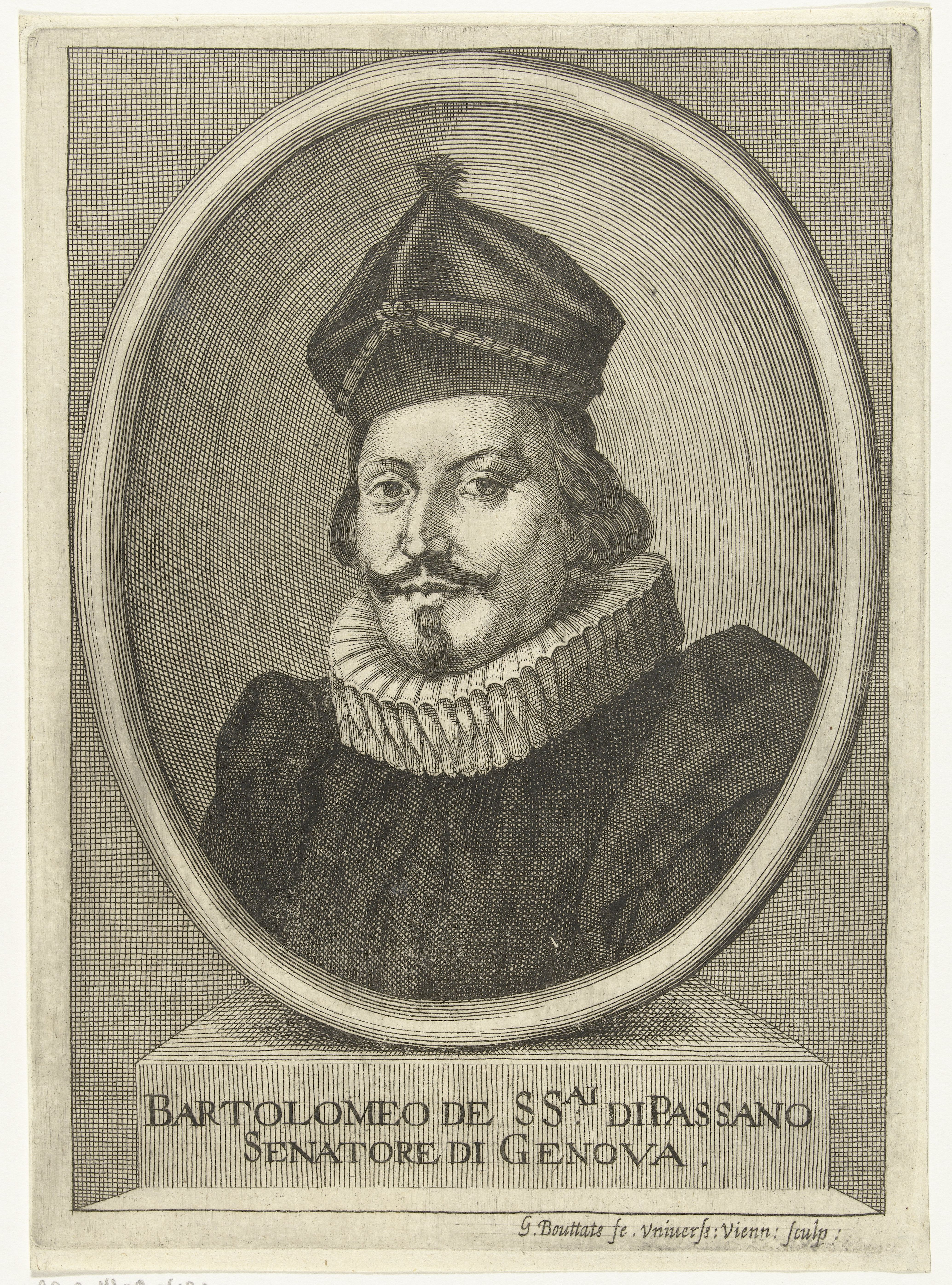 Retrato de Bartolomeo di Passano grabado por Gerard Bouttats, que lo firma en Viena como grabador de la Universidad. Lo publica el conde Galeazzo Gualdo Priorato en "Vite et azzioni di personaggi militari, e politici", Viena, 1674.